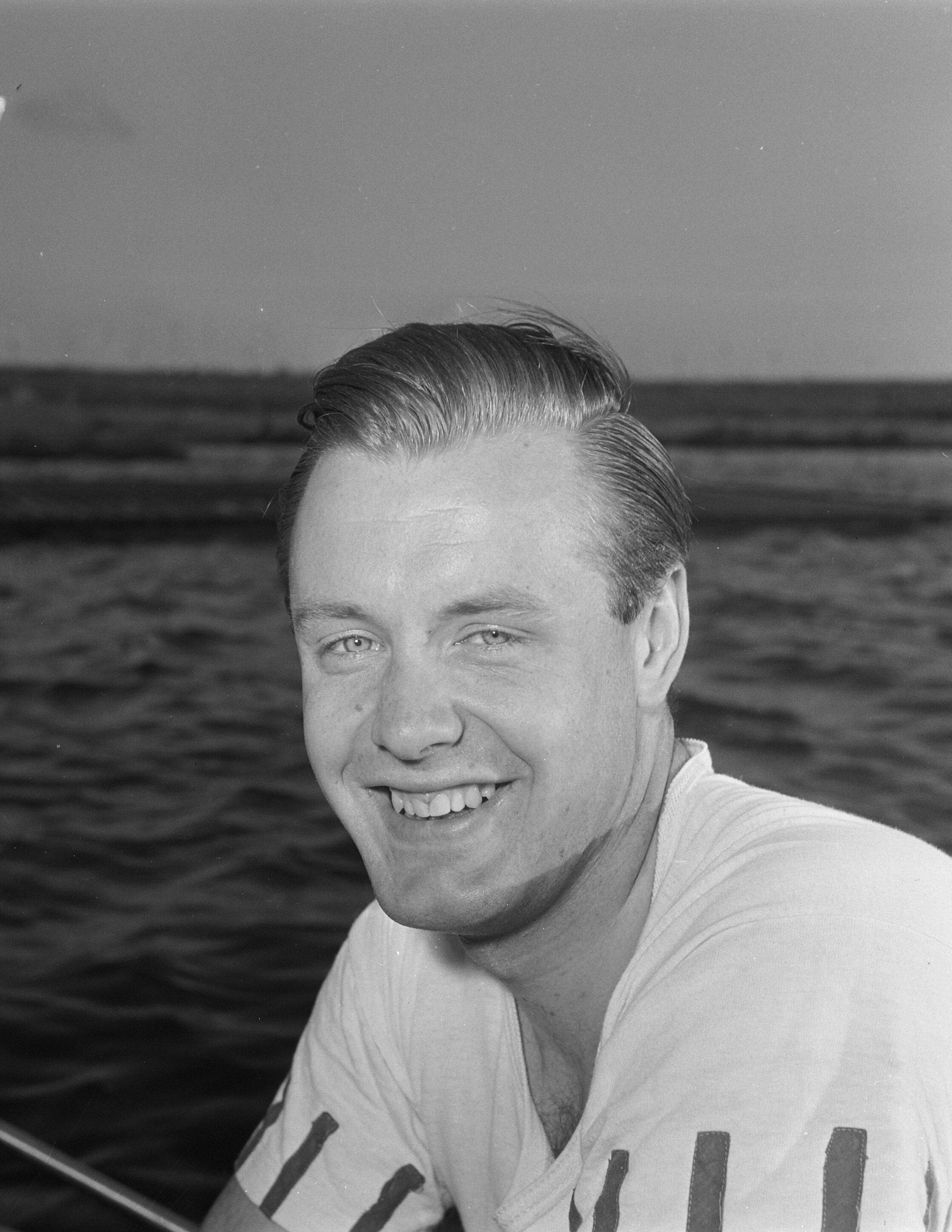 Collectie / Archief : Fotocollectie Anefo Reportage / Serie : [ onbekend ] Beschrijving : Roeien. Vier met Stuurman. Han Heijenbrock Annotatie : Geselecteerd voor Olympische Spelen van Helsinki Datum : 13 mei 1952 Trefwoorden : portretten, roeien, sporters Persoonsnaam : Heijenbrock, Han Fotograaf : Noske, J.D. / Anefo Auteursrechthebbende : Nationaal Archief Materiaalsoort : Negatief (zwart/wit) Nummer archiefinventaris : bekijk toegang 2.24.01.03 Bestanddeelnummer : 905-1093